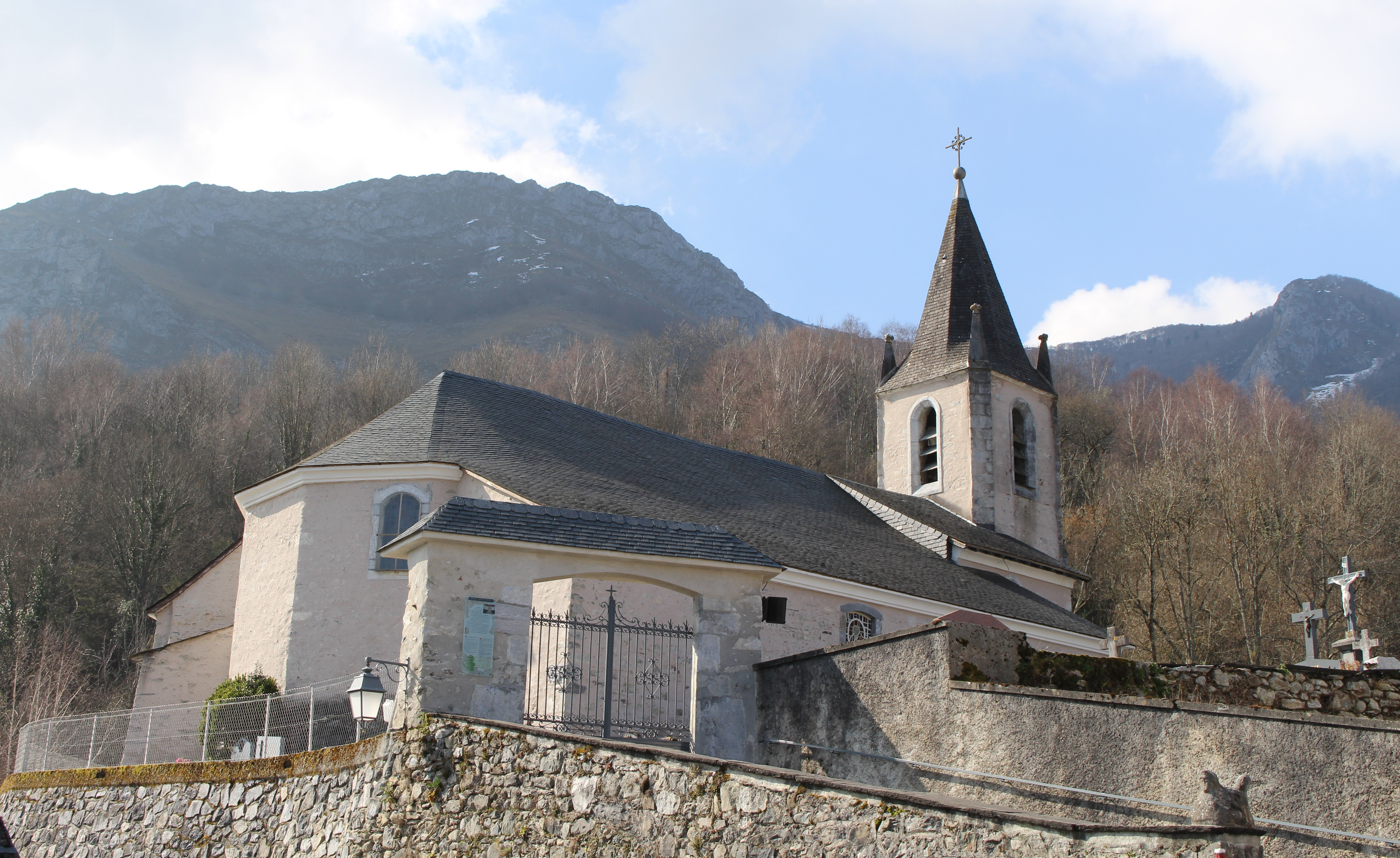 Église Saint-Pierre de Ségus (Hautes-Pyrénées)